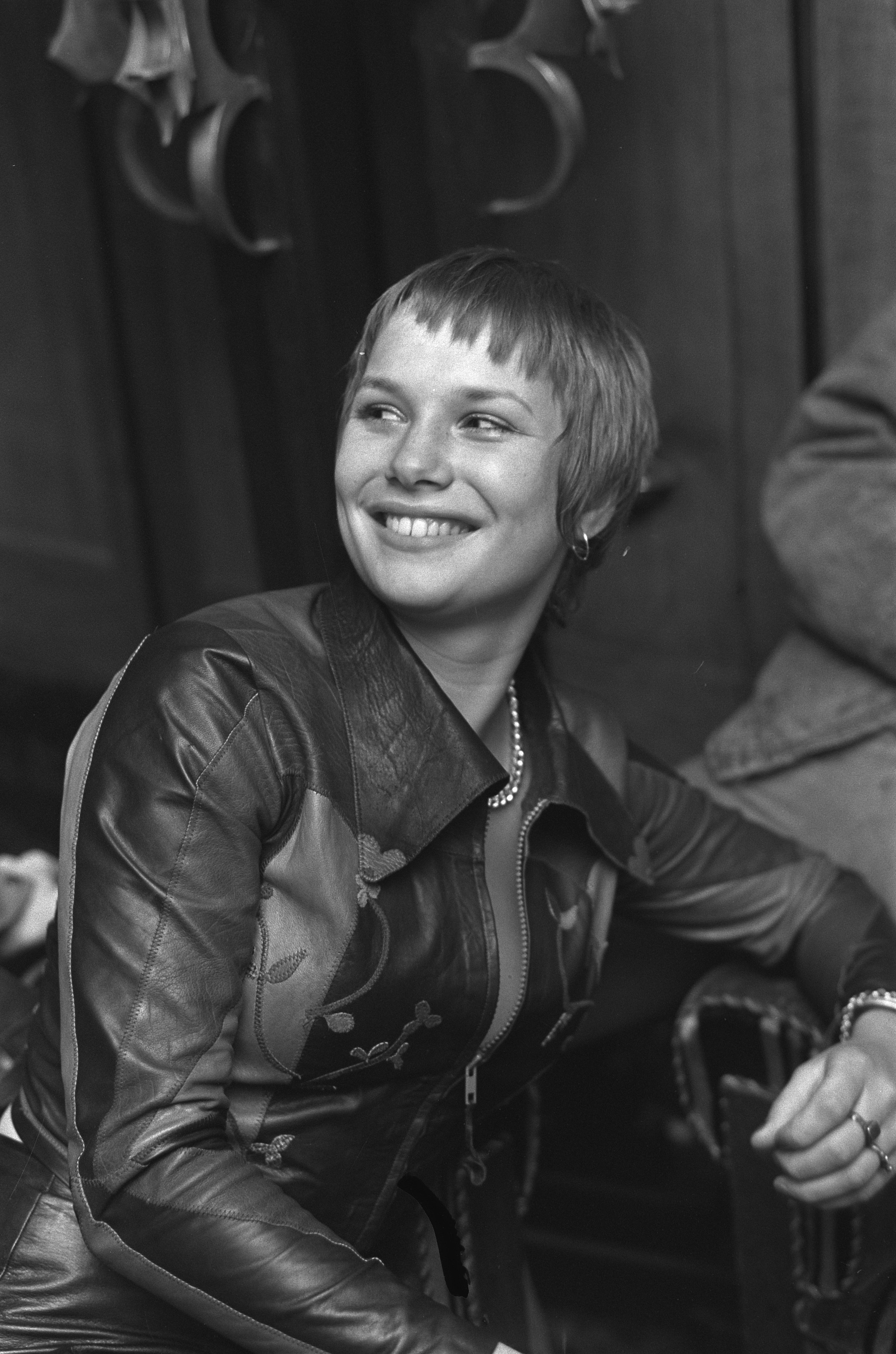 Premiere-voorstelling film "Turks Fruit" in Tuschinski, hoofdrolspeelster Monique van der Ven